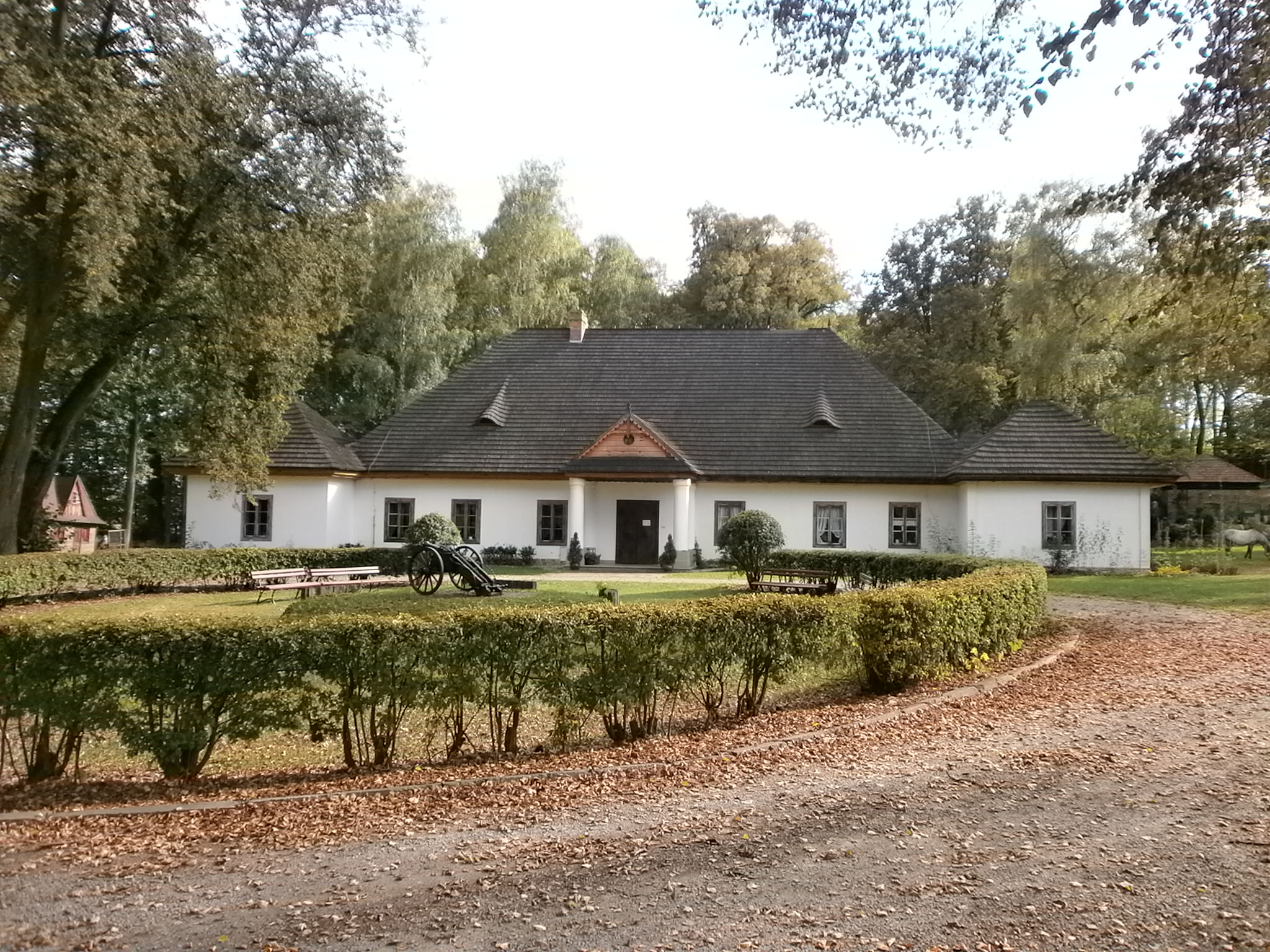 Świdnik, dwór, XVII/XVIII